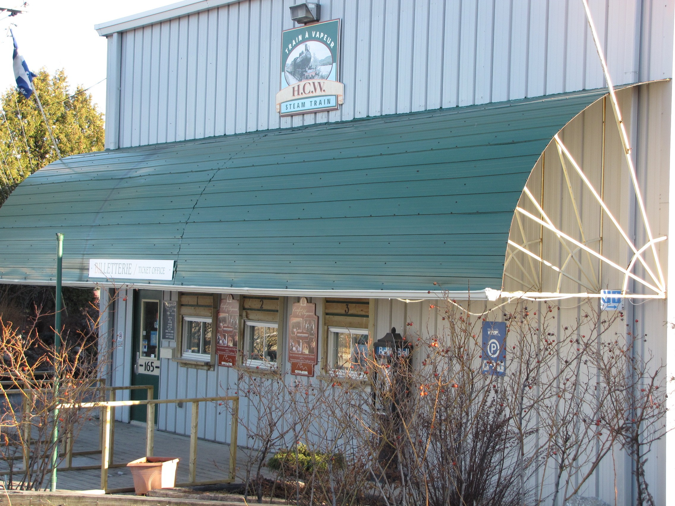 Billetterie et gare du "Petit Train de Wakefield" dans le secteur du boul. de la Carrière, secteur Hull, Gatineau, Québec.